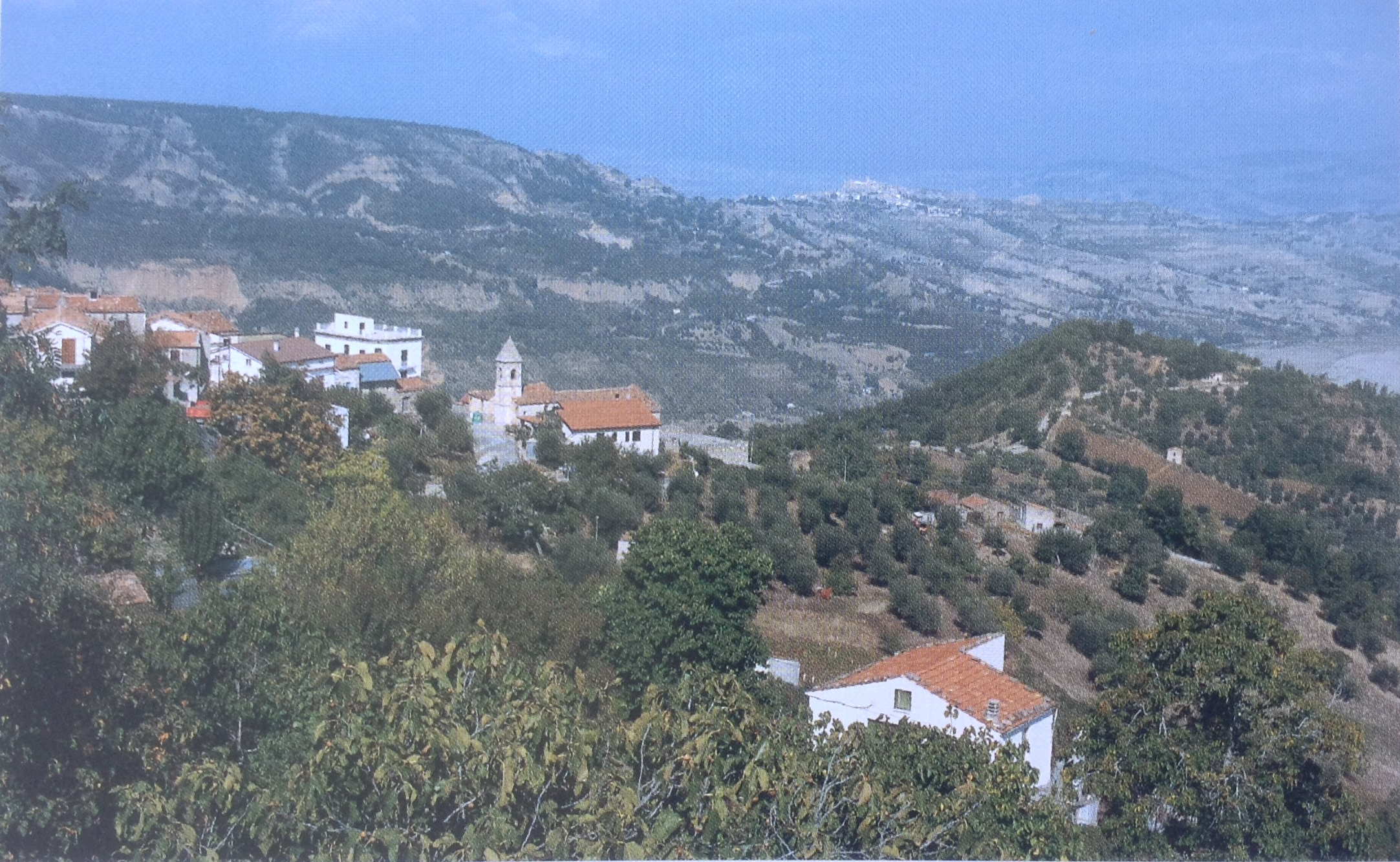 San Paolo Albanese